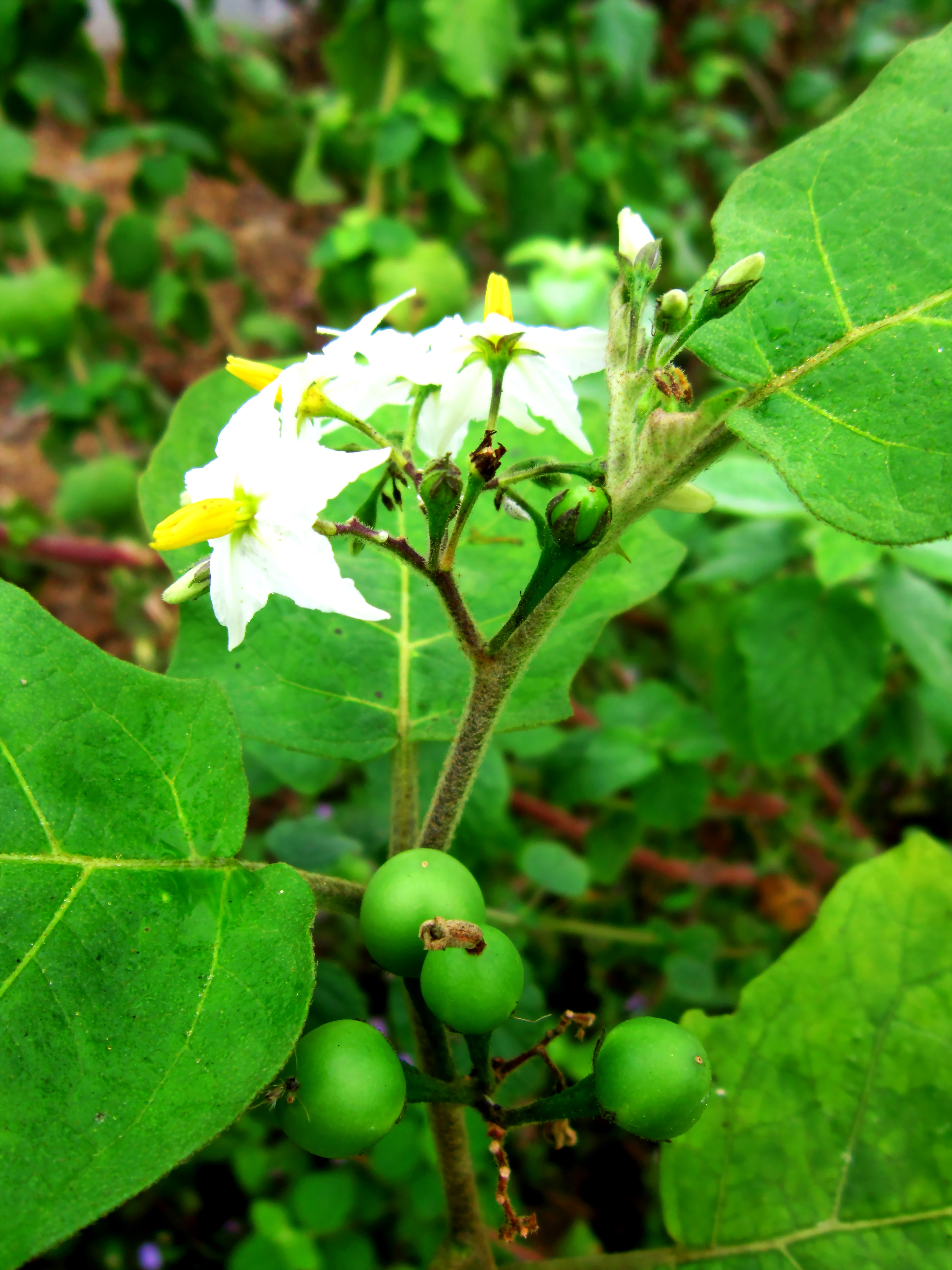 Lá, hoa và trái cà dại hoa trắng, tên khoa học: Solanum torvum Swartz, thuộc họ Cà (Solanaceae).